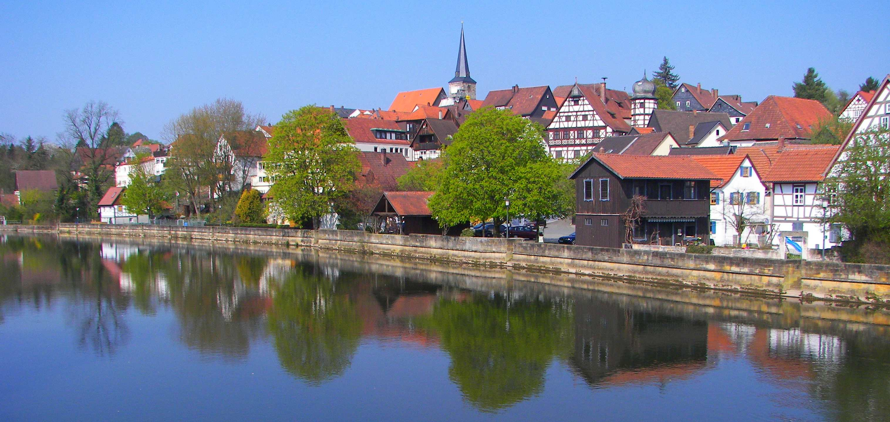 Marktzeuln von der Rodach aus gesehen